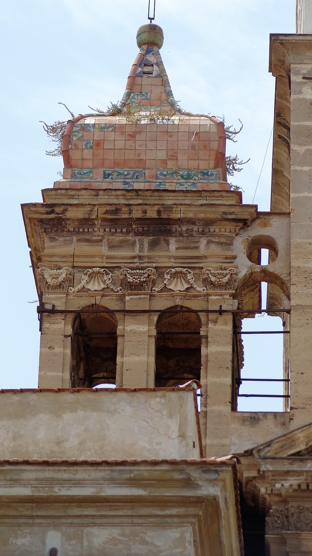 Campanile con piastrelle maiolicate.